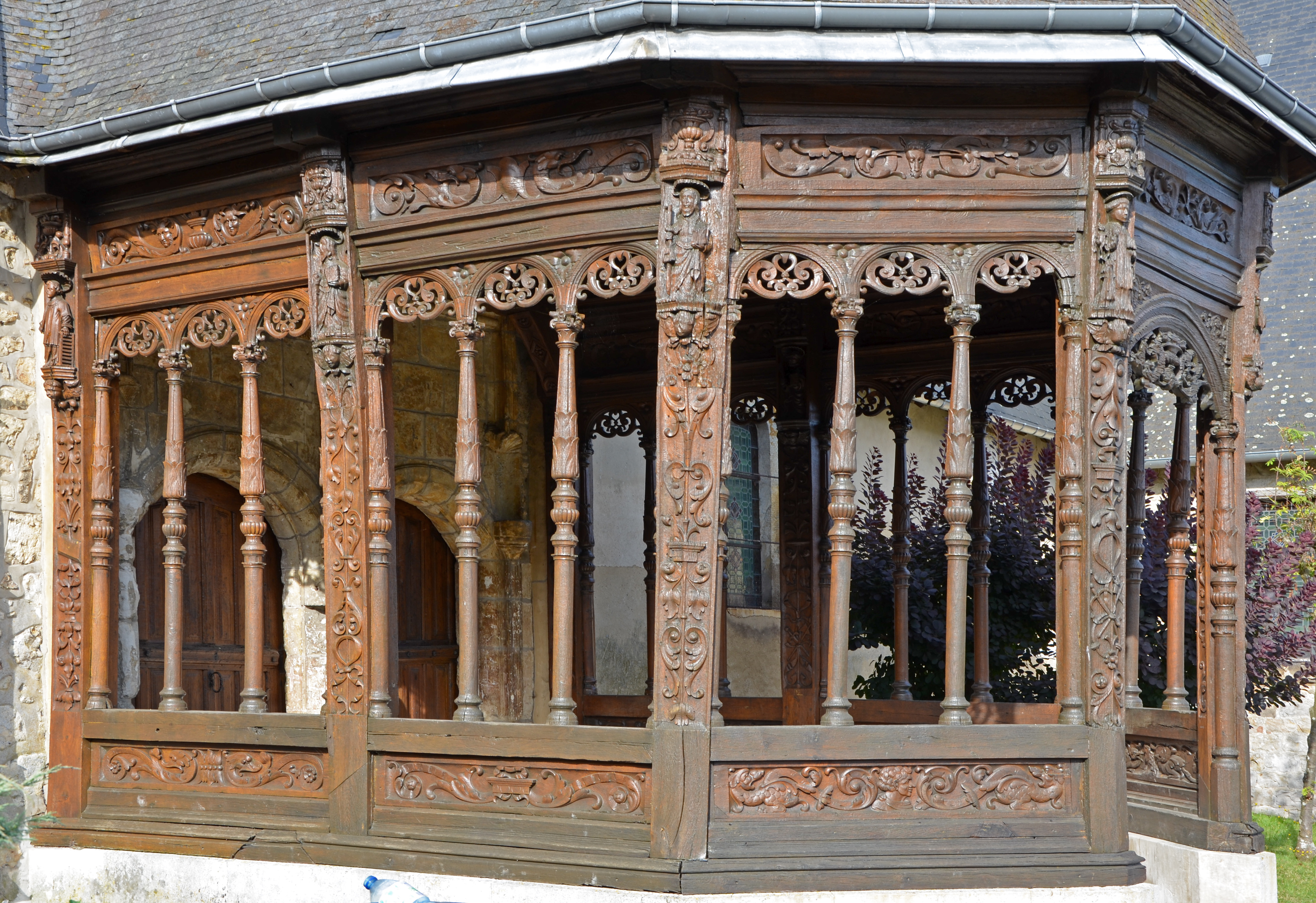 Auvent du porche de l'église de Ry, Seine-Maritime, Normandie, France